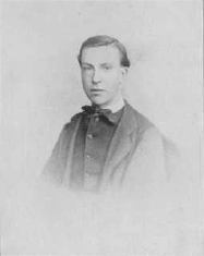 Johannes Theodorus Petrus (Jan) de Groot in 1864.Joannes Vincentius de Groot (Uit: B.H. Molkenboer en A.H.M.J. van Rooy (samenst.), Pater de Groot. Herdenking en hulde, Teulings Uitgeversmaatschappy, 's Hertogenbosch, 1923.)